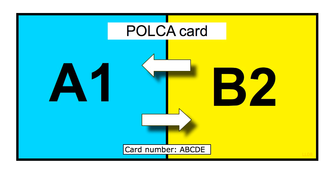 POLCA card